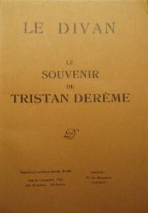 Revue littéraire Le Divan. Article principal de ce numéro : le souvenir de Tristan Derème, poète.